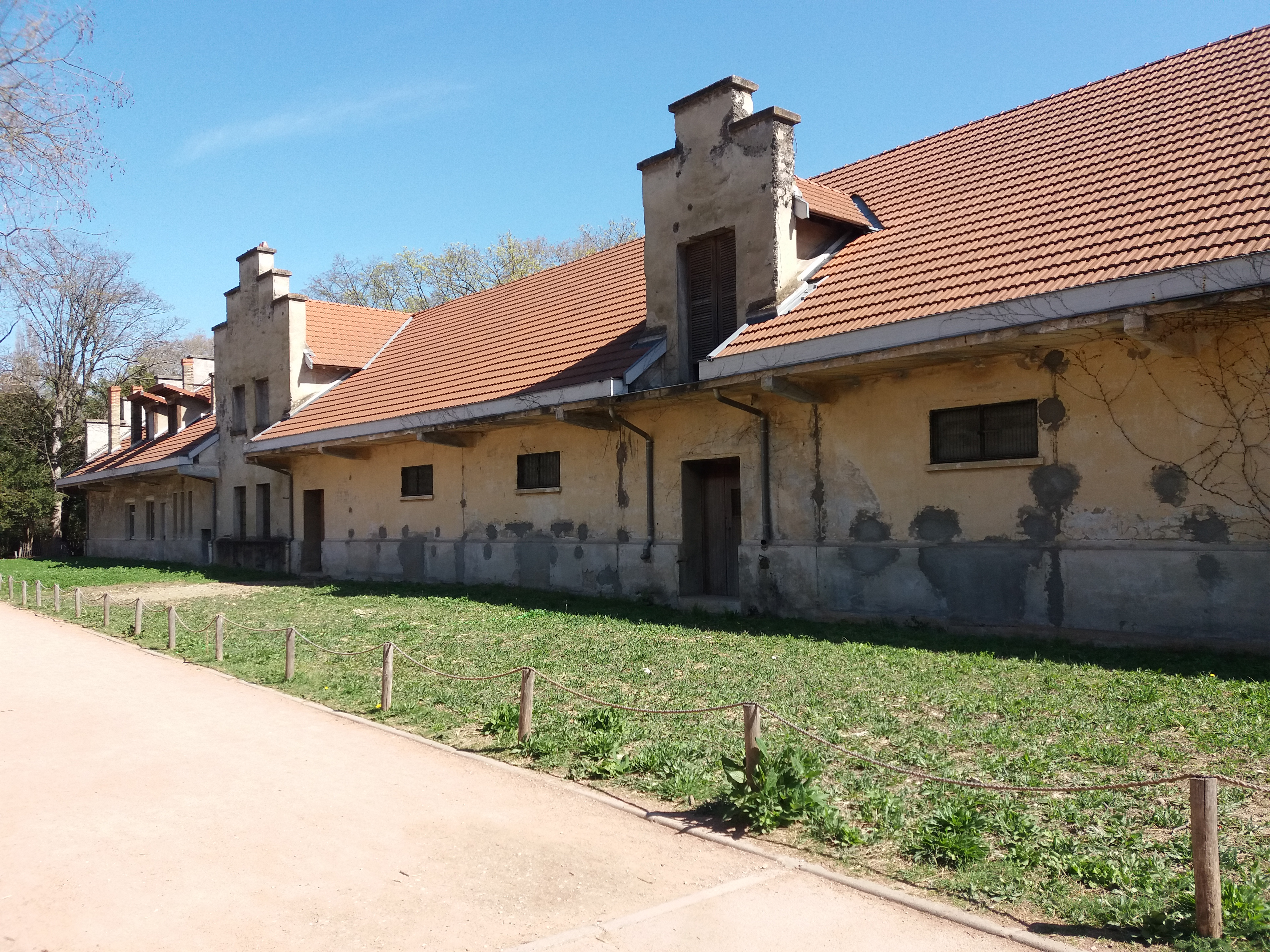 Vue depuis l'allée du Parc aux Moutons.